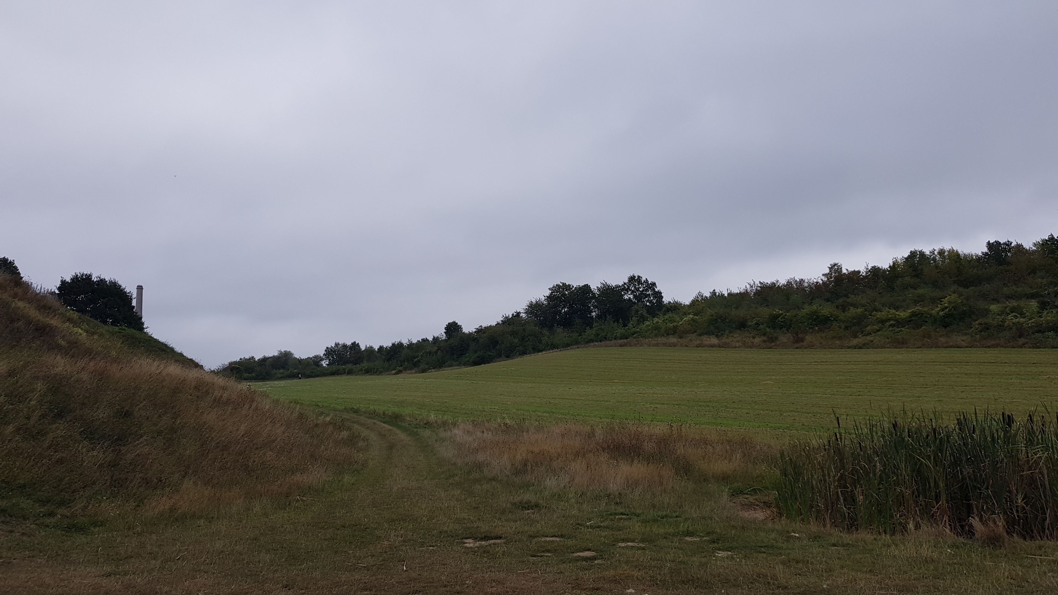 Poppelmondedal, Sint-Pietersberg, Maastricht, Nederland